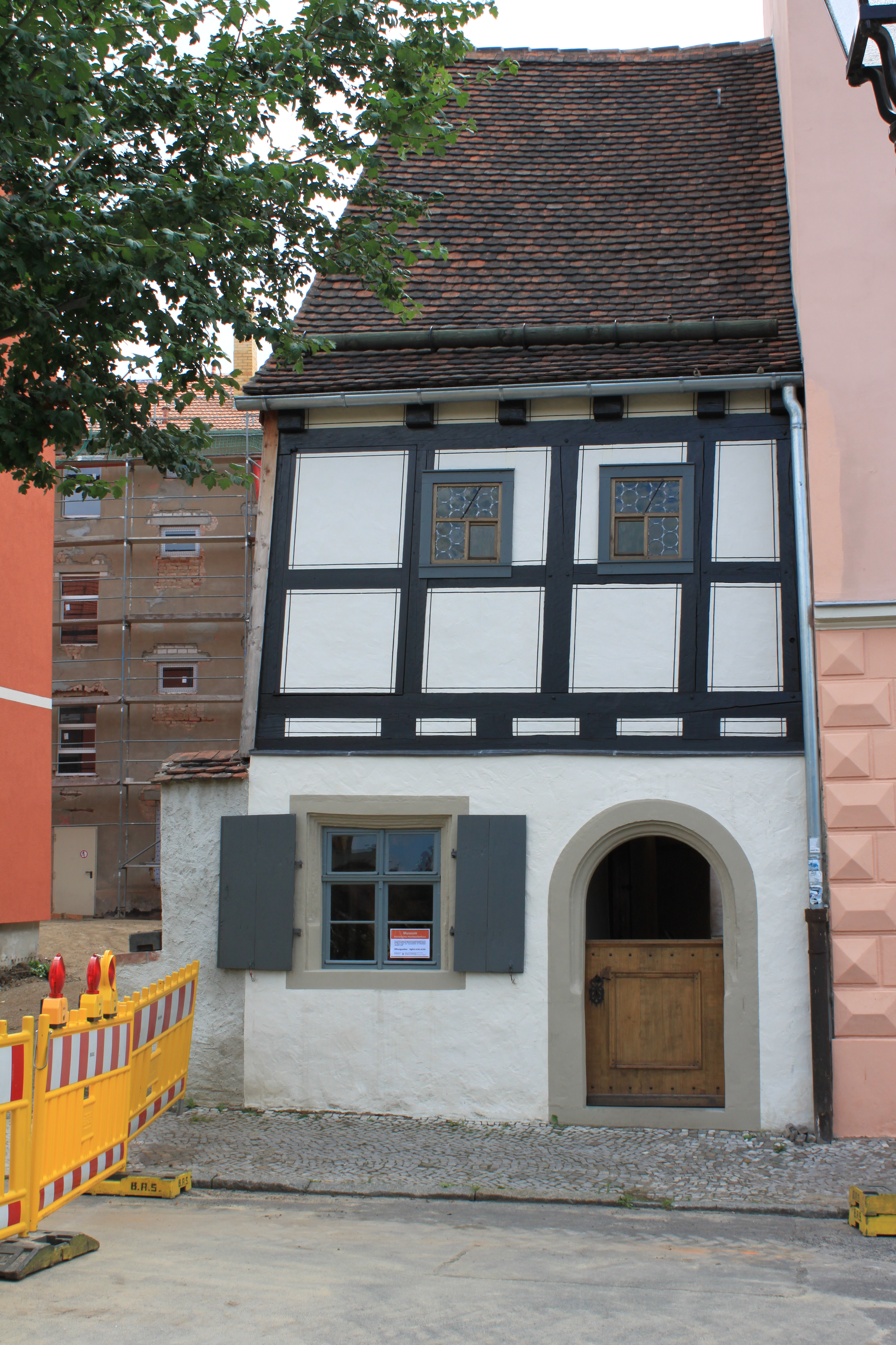 Kleines Handwerkerhaus, Torgau, Rosa-Luxemburg-Platz 4